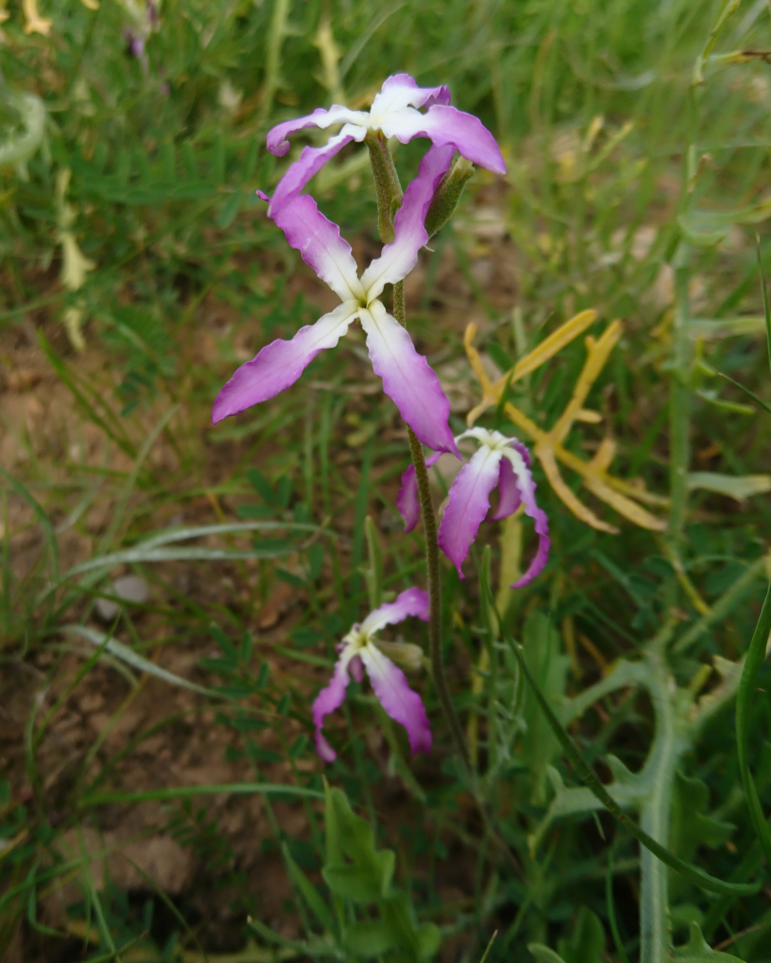 زمان رویش بهمن‌ماه تا فروردین